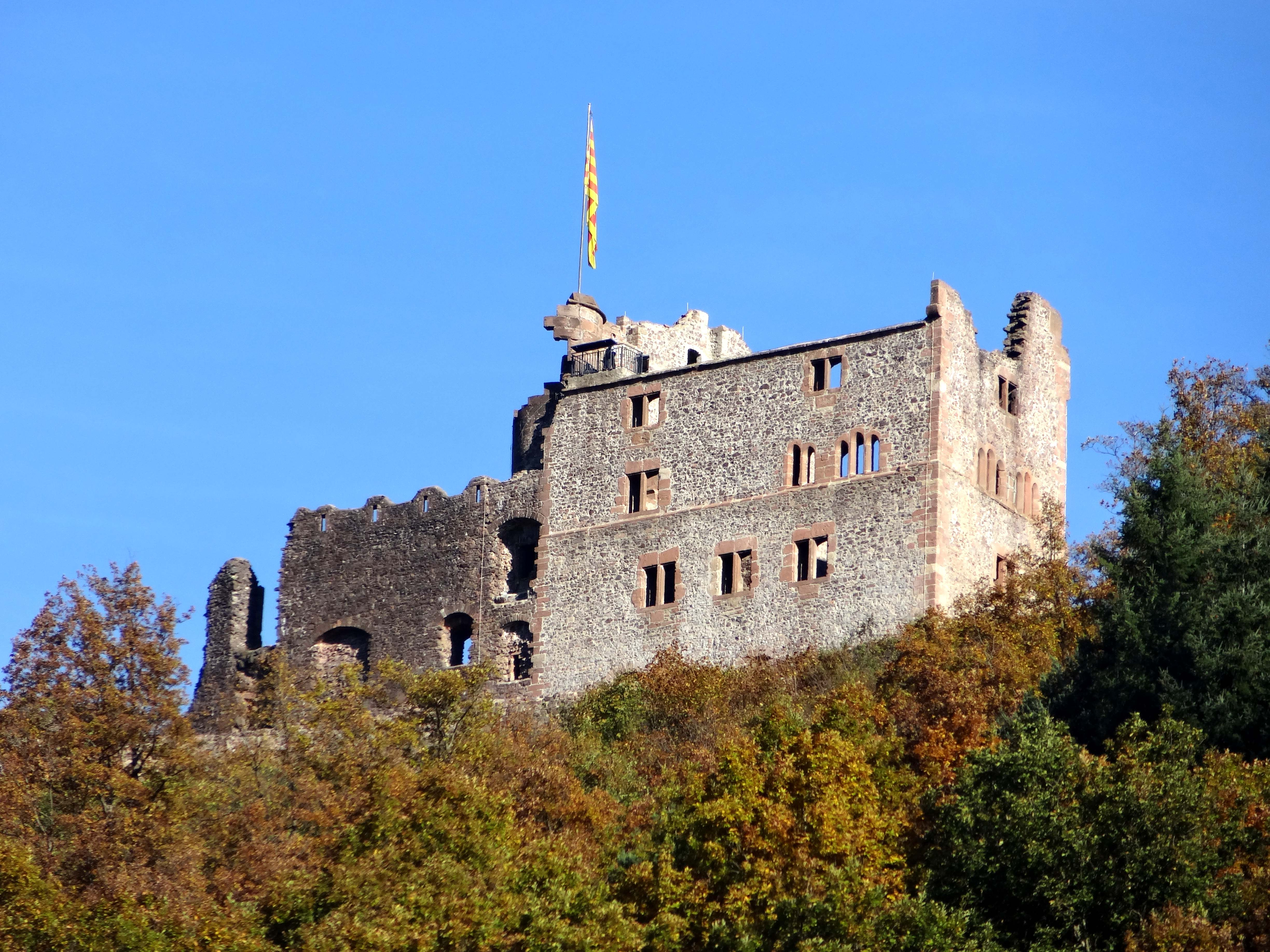 Burgruine Hohengeroldseck - siehe Titel.